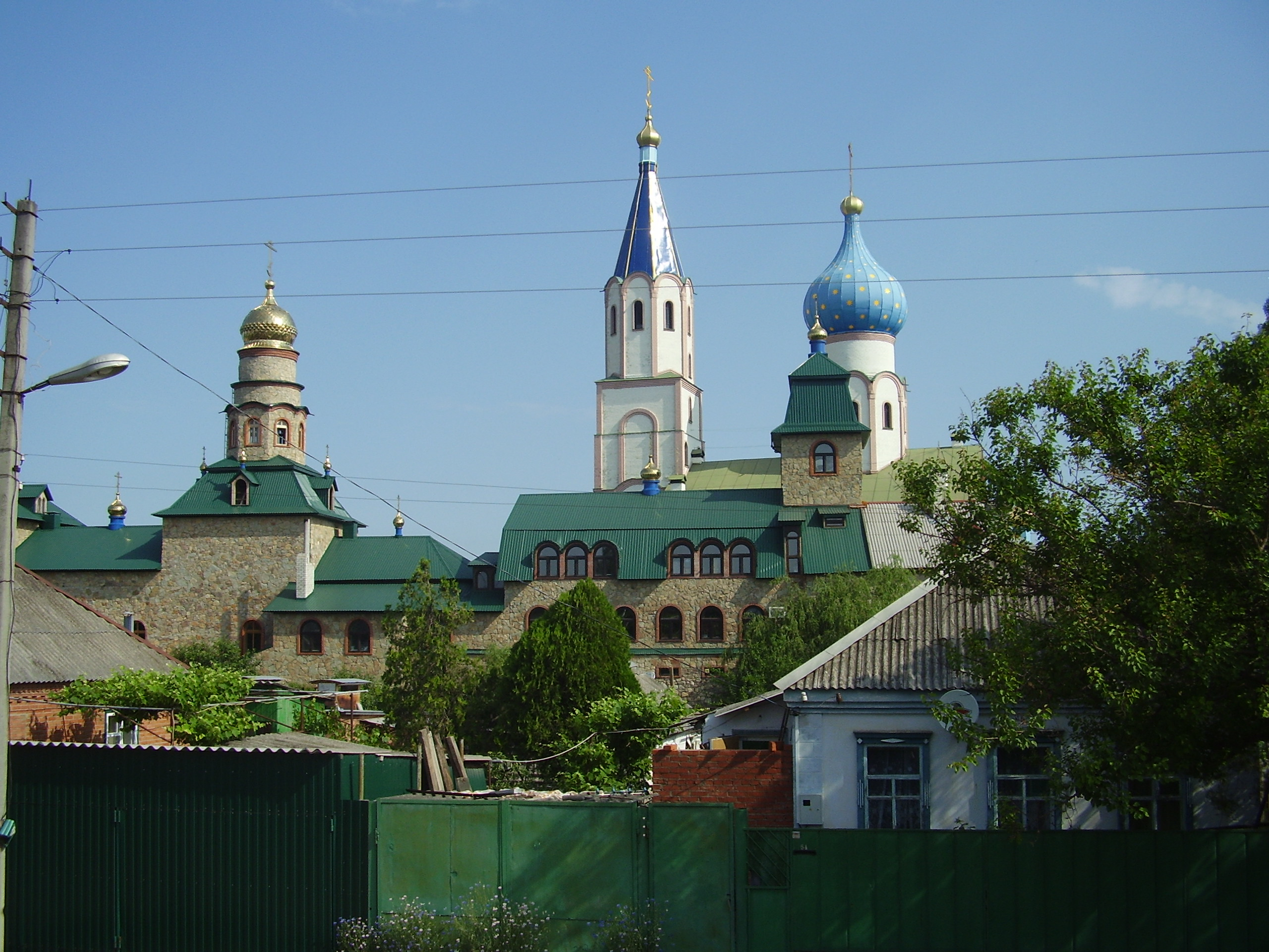 Краснодарский край, город Тимашёвск. Свято-Духов монастырь.